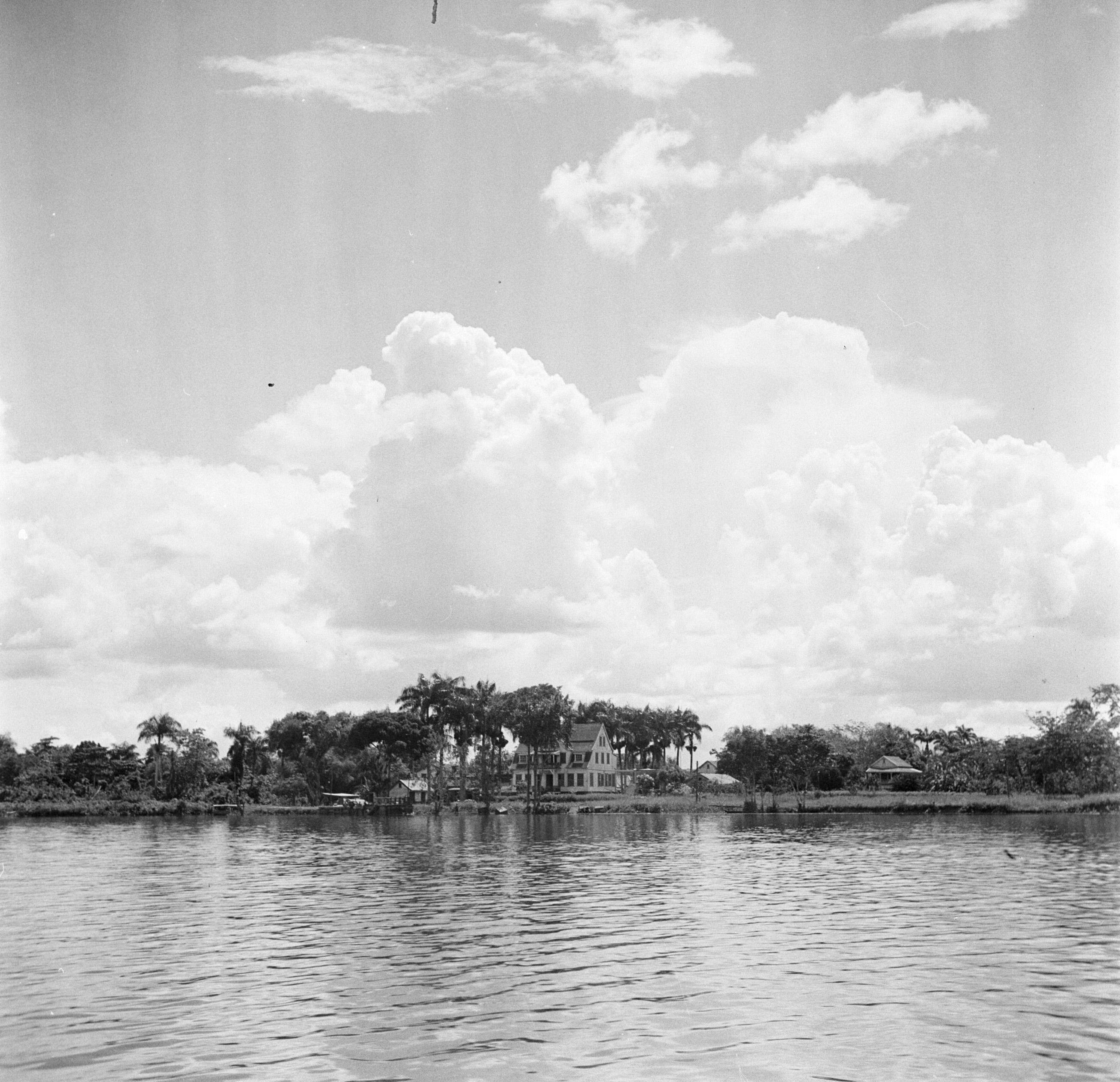 Collectie / Archief : Fotocollectie Van de Poll Reportage / Serie : Reis naar Suriname en de Nederlandse Antillen Beschrijving : Leprozerie Groot-Chatillon gezien vanaf de Surinamerivier in Suriname Datum : 1947 Locatie : Suriname Trefwoorden : lepra, rivieren, ziekenhuizen Fotograaf : Poll, Willem van de, [onbekend] Auteursrechthebbende : Nationaal Archief Materiaalsoort : Negatief (zwart/wit) Nummer archiefinventaris : bekijk toegang 2.24.14.02 Bestanddeelnummer : 252-6265